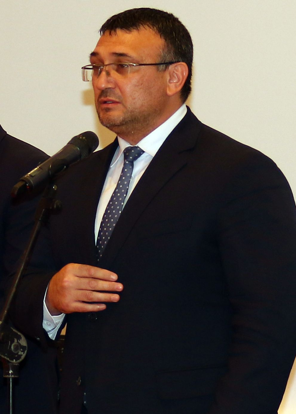 Младен Маринов - български офицер от МВР и юрист. Министър на вътрешните работи на България (2018-)